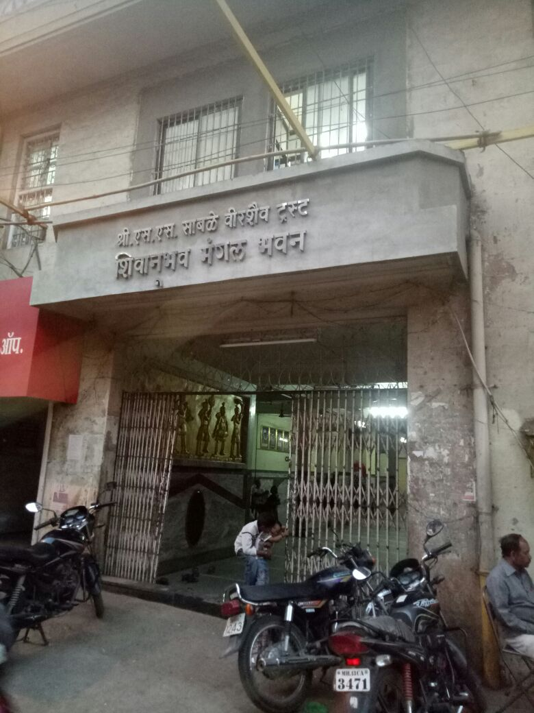 अष्टविनायक कामेश्वर गणपती मंदीर